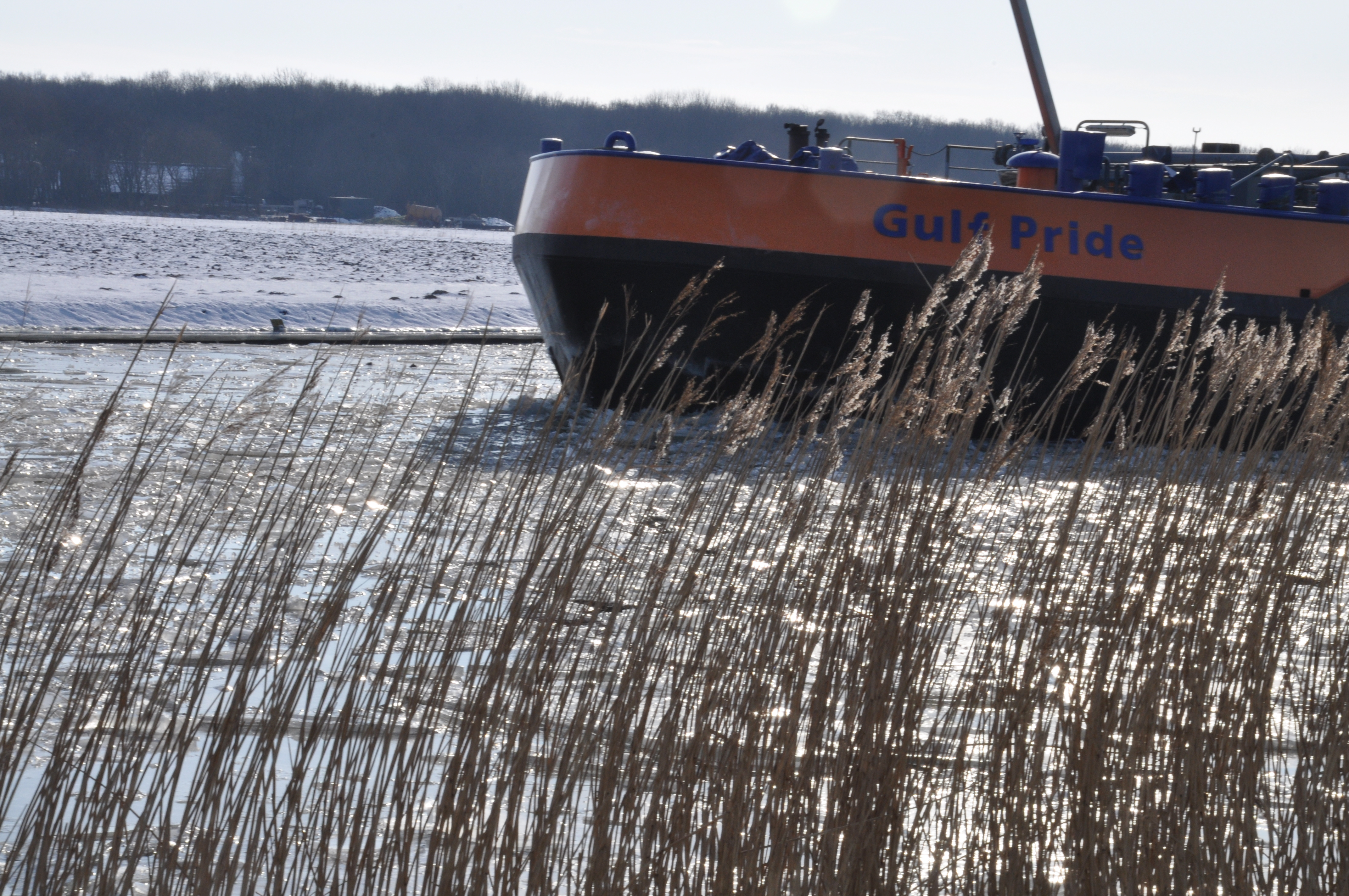 IJssbrekers die de weg vrij makenvooreen tanker.